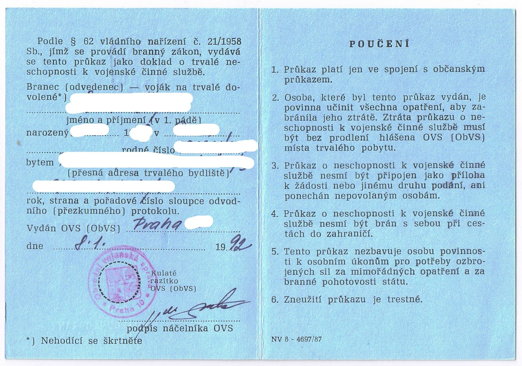 „Modrá knížka“, průkaz o neschopnosti k vojenské činné službě, vnitřní strana.